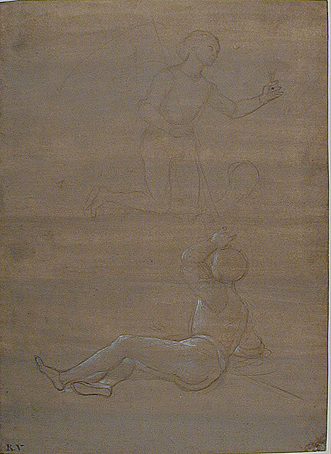 Rafael Sanzio (Urbino, Itália, 1483 - Roma, Itália, 1520) "Estudos de Soldado da Ressurreição de Cristo e de um Anjo" Desenho; 32,7 x 23,6 cm Acervo do Ashmolean Museum, Oxford (Reino Unido)